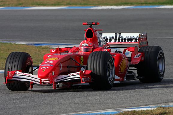 Michael Schumacher testing at Jerez, Spain.